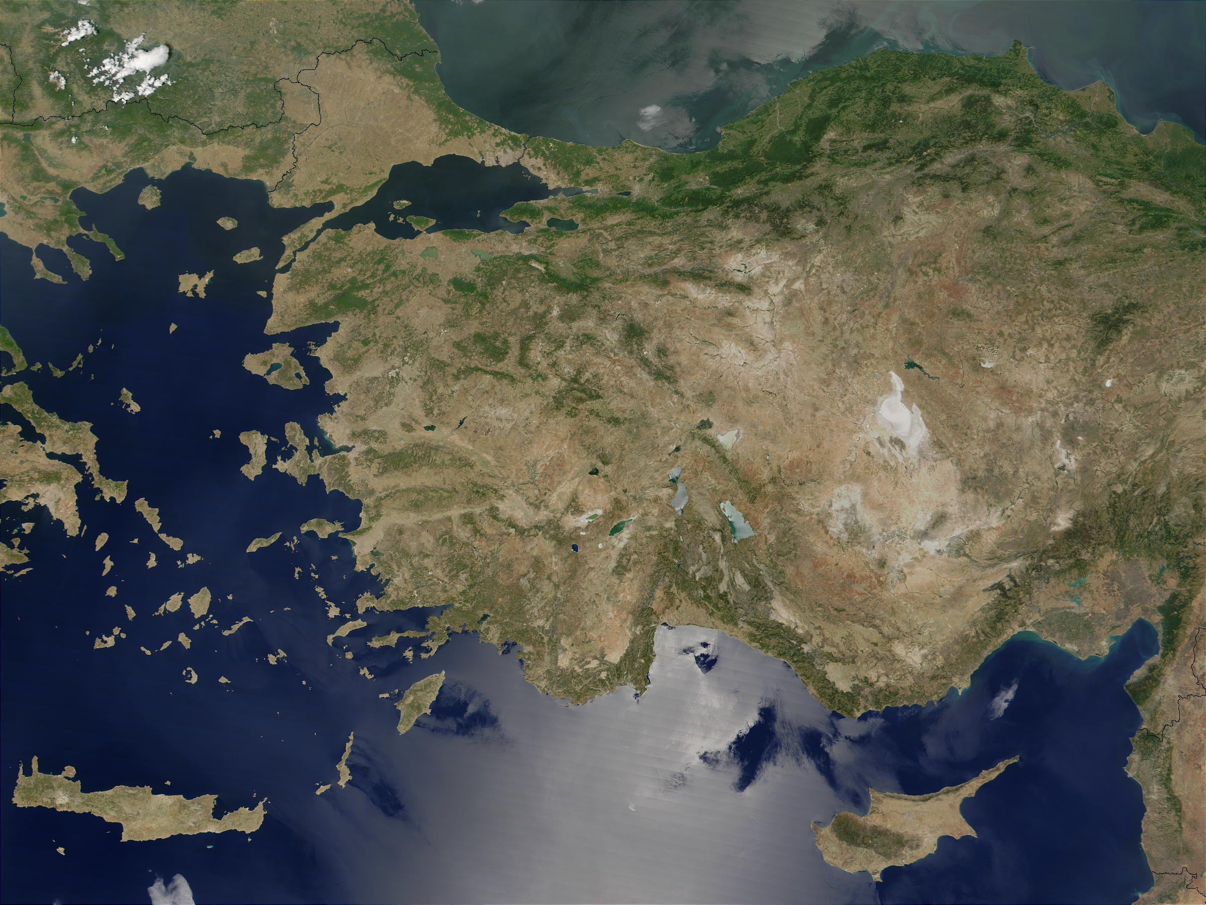 Satellietfoto van Turkije.